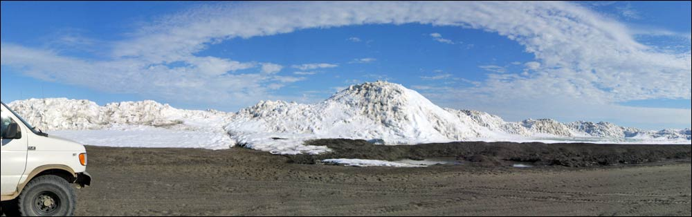 Utsnitt fra bilde herfra Eng Wiki